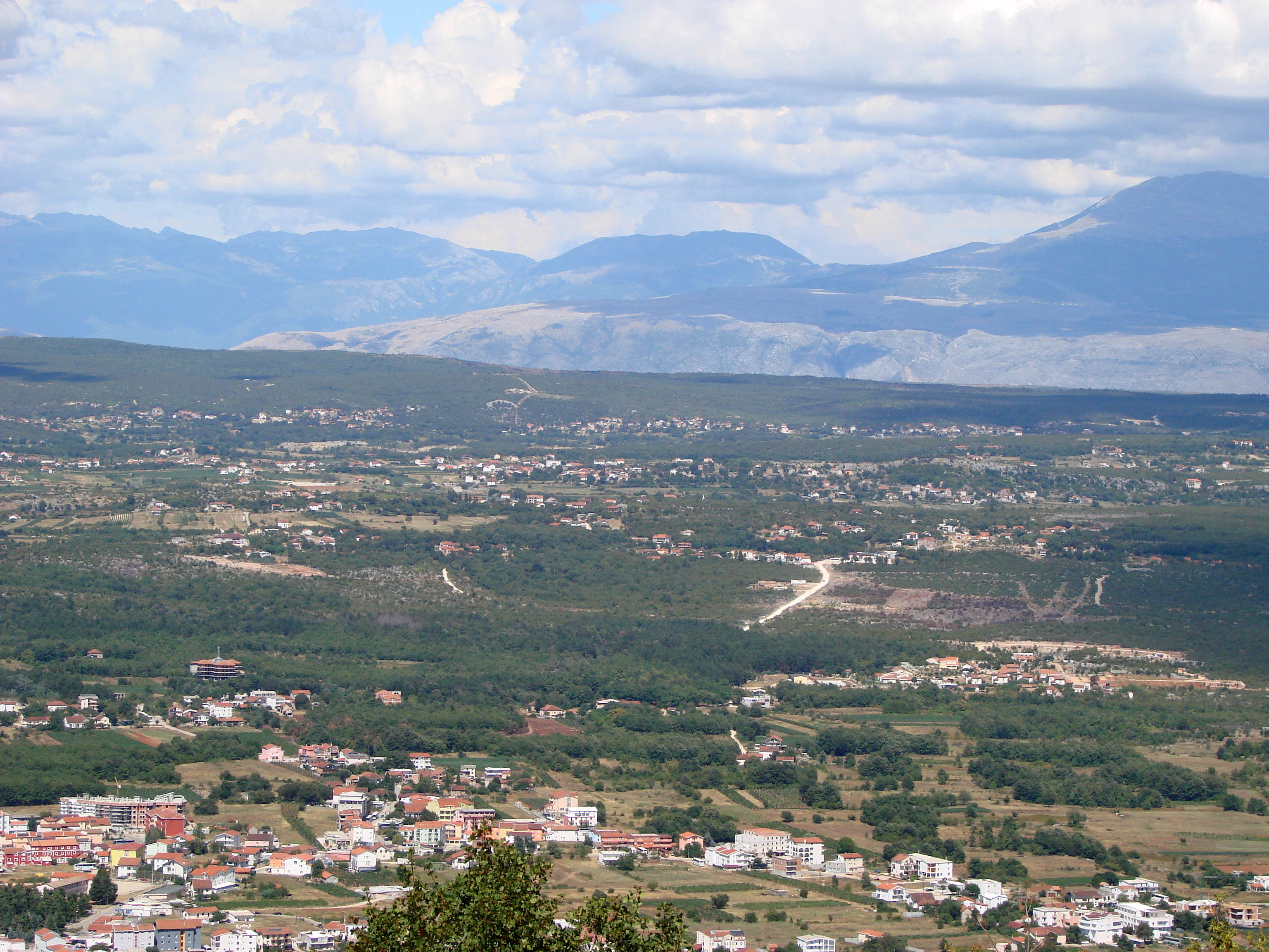 Miejscowość w Bośni i Hercegowinie położona w południowej części Hercegowiny na południowy zachód od Mostaru.